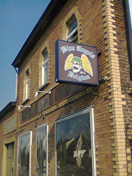 Foto van het clublokaal van de Blue Angels in Erpe (Erpe-Mere)